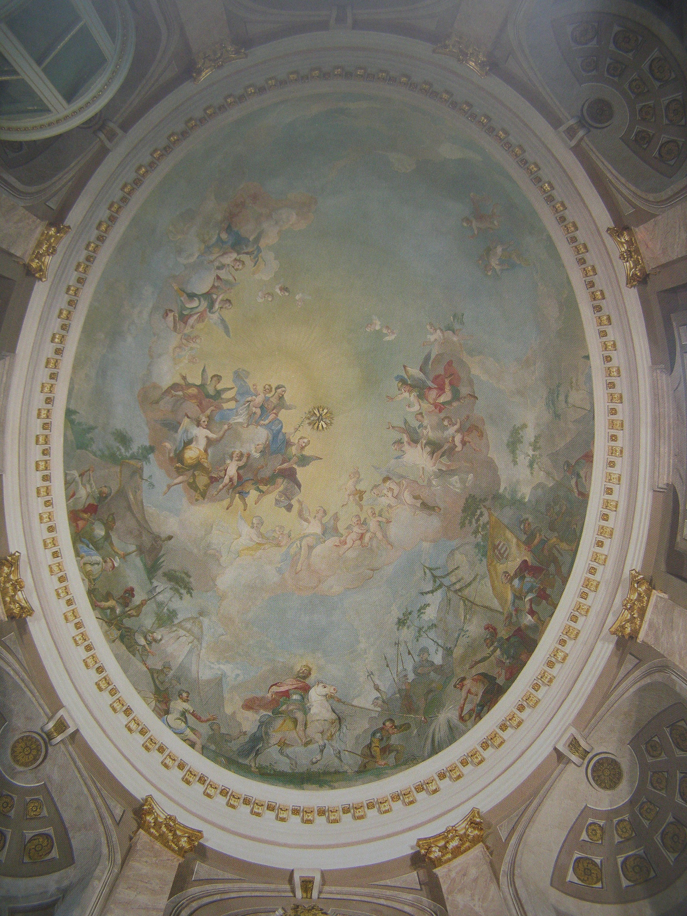 Franz Anton Maulbertsch, Zázrak svätého Ladislava, 1780, freska, Kaplnka svätého Ladislava (Primaciálny palác), Bratislava